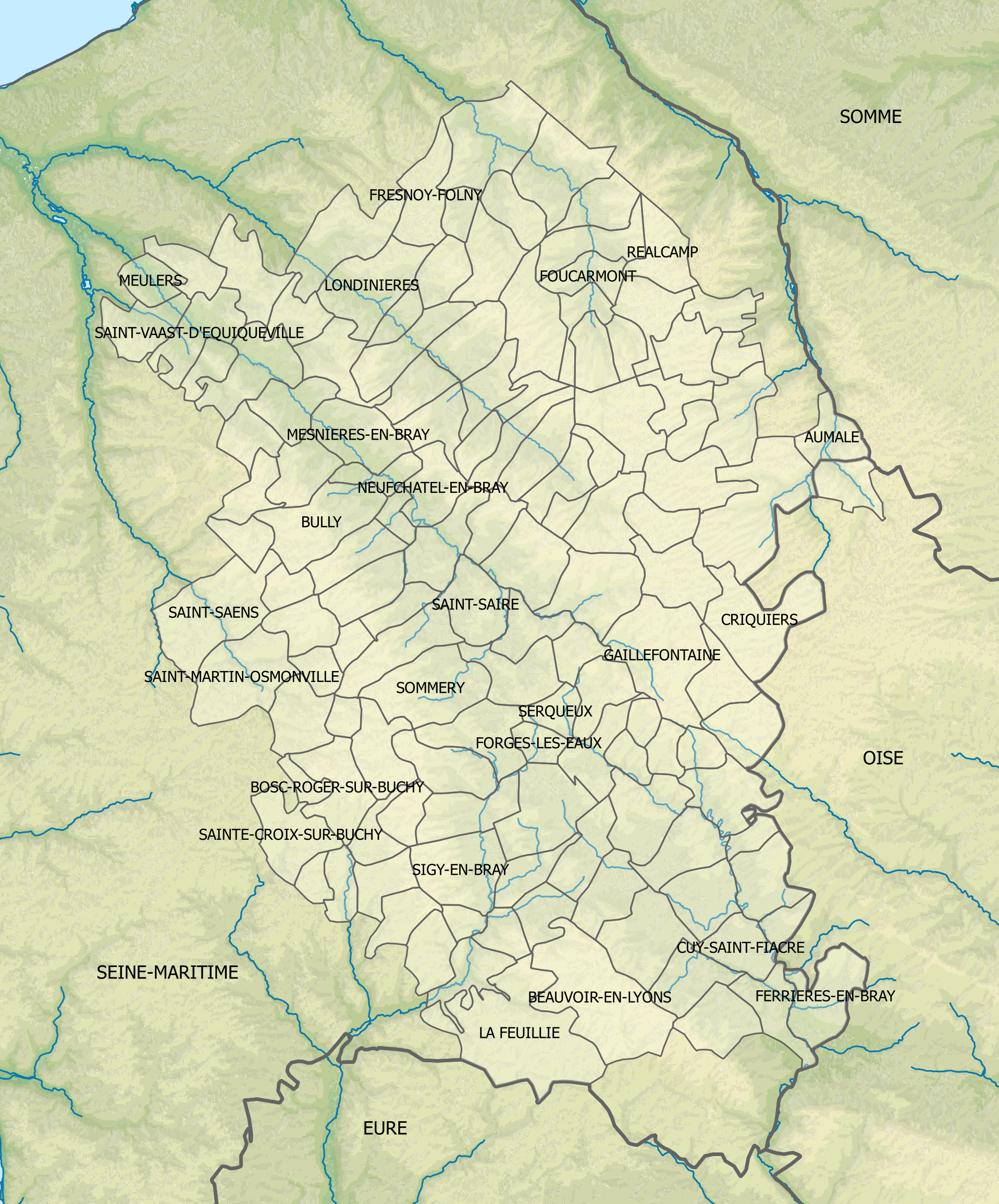 Carte des communes appartenant à l'appellation AOP du Neufchâtel. Sources des données : GEOFLA de l'IGN, "licence ouverte" version 1.0 NASA Shuttle Radar Topography Mission (SRTM3 v.2 & SWBD) (domaine public) ; Aires géographiques des AOC/AOP produit par l'INAO , "licence ouverte" version 1.0 Directive Cadre sur l'Eau